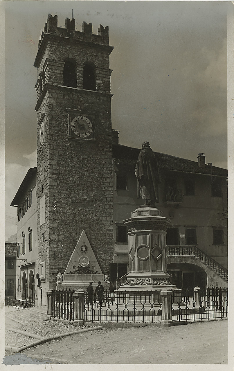 Pieve di Cadore m900. Monumenti a Tiziano e P.F. Calvi = fautori dell'Indipendenza Italiana